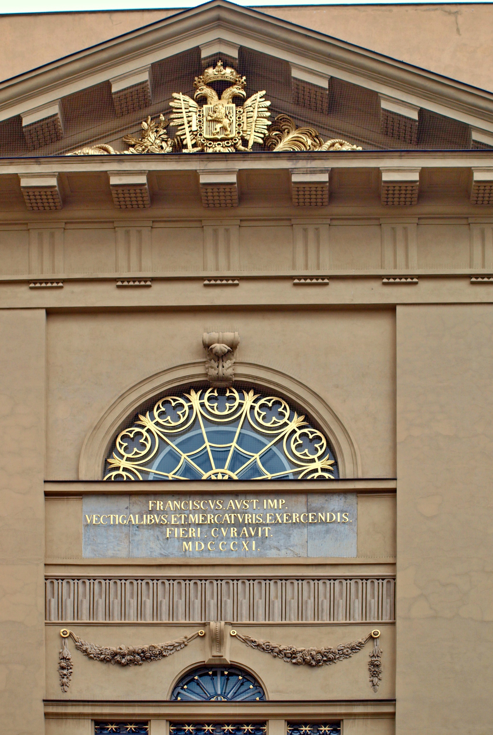 U Hybernů